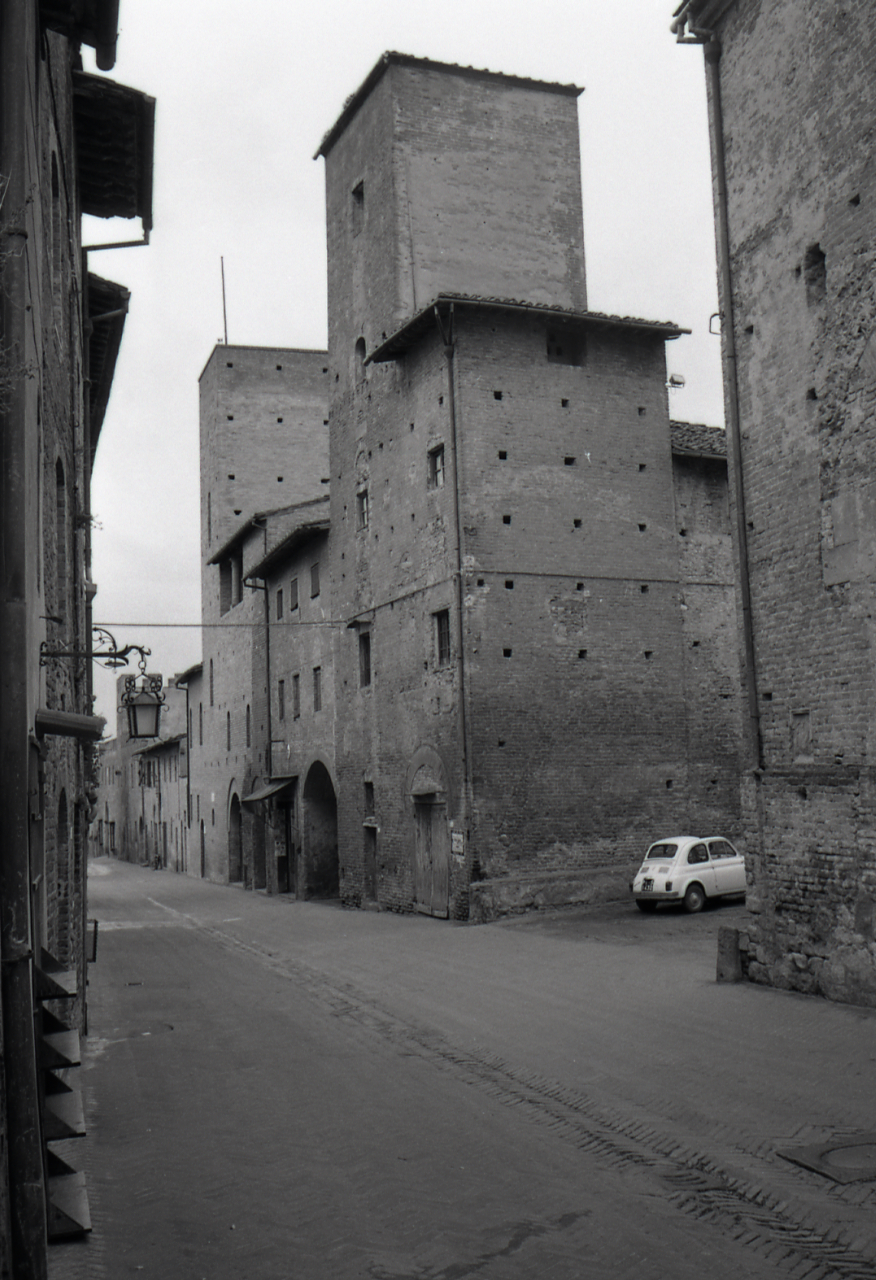 Servizio fotografico : Certaldo, 1965 / Paolo Monti. - Strisce: 2, Fotogrammi complessivi: 7 : Negativo b/n, gelatina bromuro d'argento/ pellicola ; 35 mm. - ((I fotogrammi hanno una doppia numerazione. - Sul portanegativi: Leica 21mm Agfa ISS. - Sul dorso del portanegativi Monti scrive: "Casa del Boccaccio - selciati". - Occasione: Pubblicazione: "Emilio CECCHI, Natalino SAPEGNO (a cura di), Storia della Letteratura Italiana, 9 voll., Milano, Garzanti, 1966 e segg."